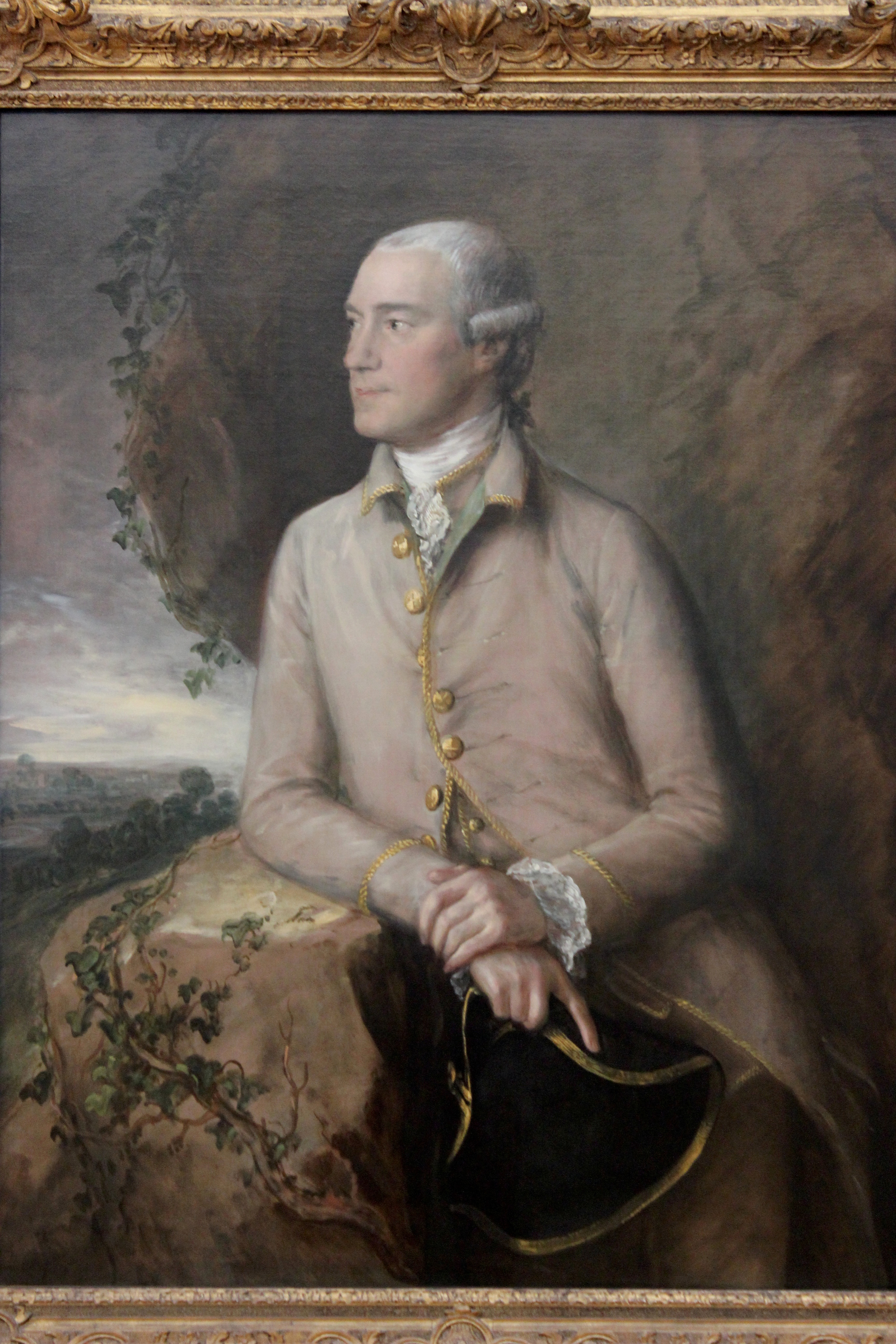 Thomas Gainsborough. Retrato de Joshua Grigby. Berlín, Gemäldegalerie.